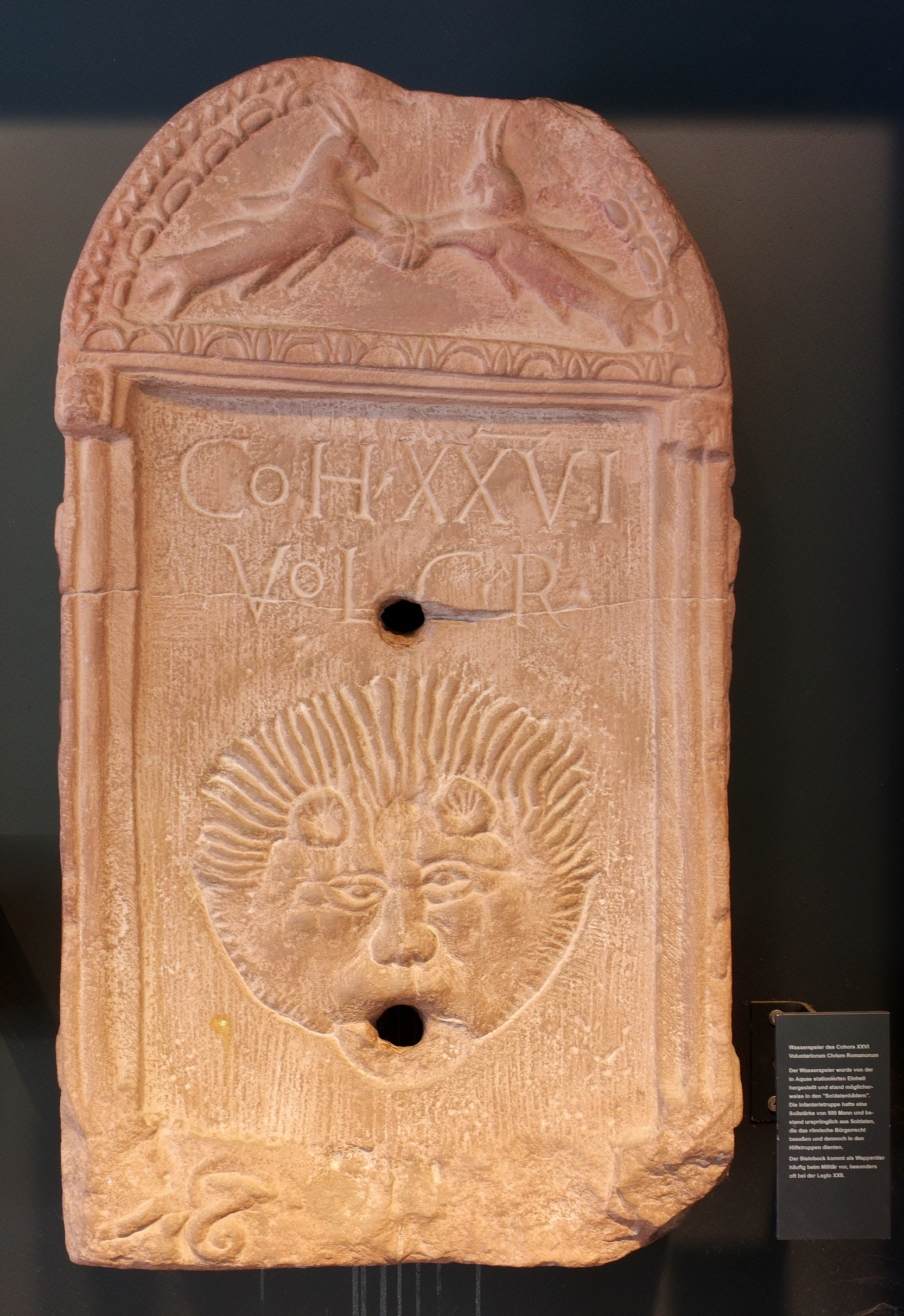 Wasserspeier des Cohors XXVI (Kopie) ausgestellt am Römerplatz Baden-Baden